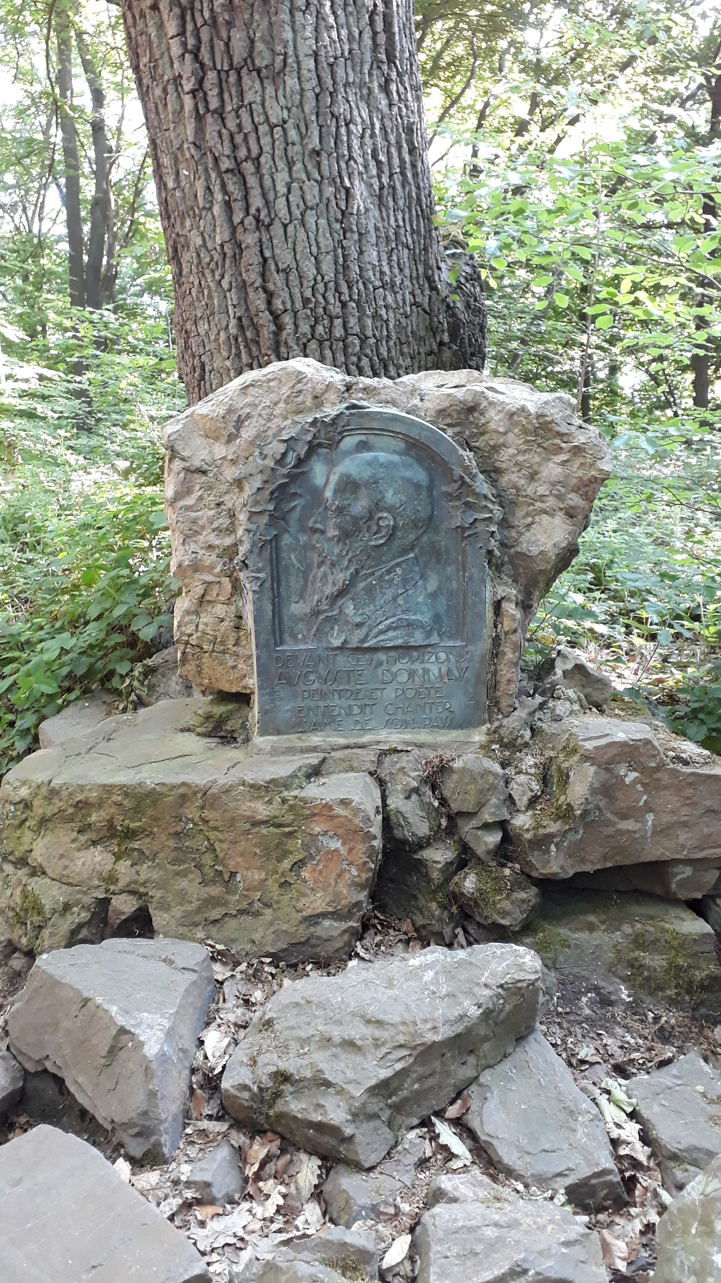 Mémorial Auguste Donnay Il est situé Bois des Manants à 4130 Esneux (Méry) - Belgique Il a été réalisé par Georges Petit et inauguré le4 septembre 1927